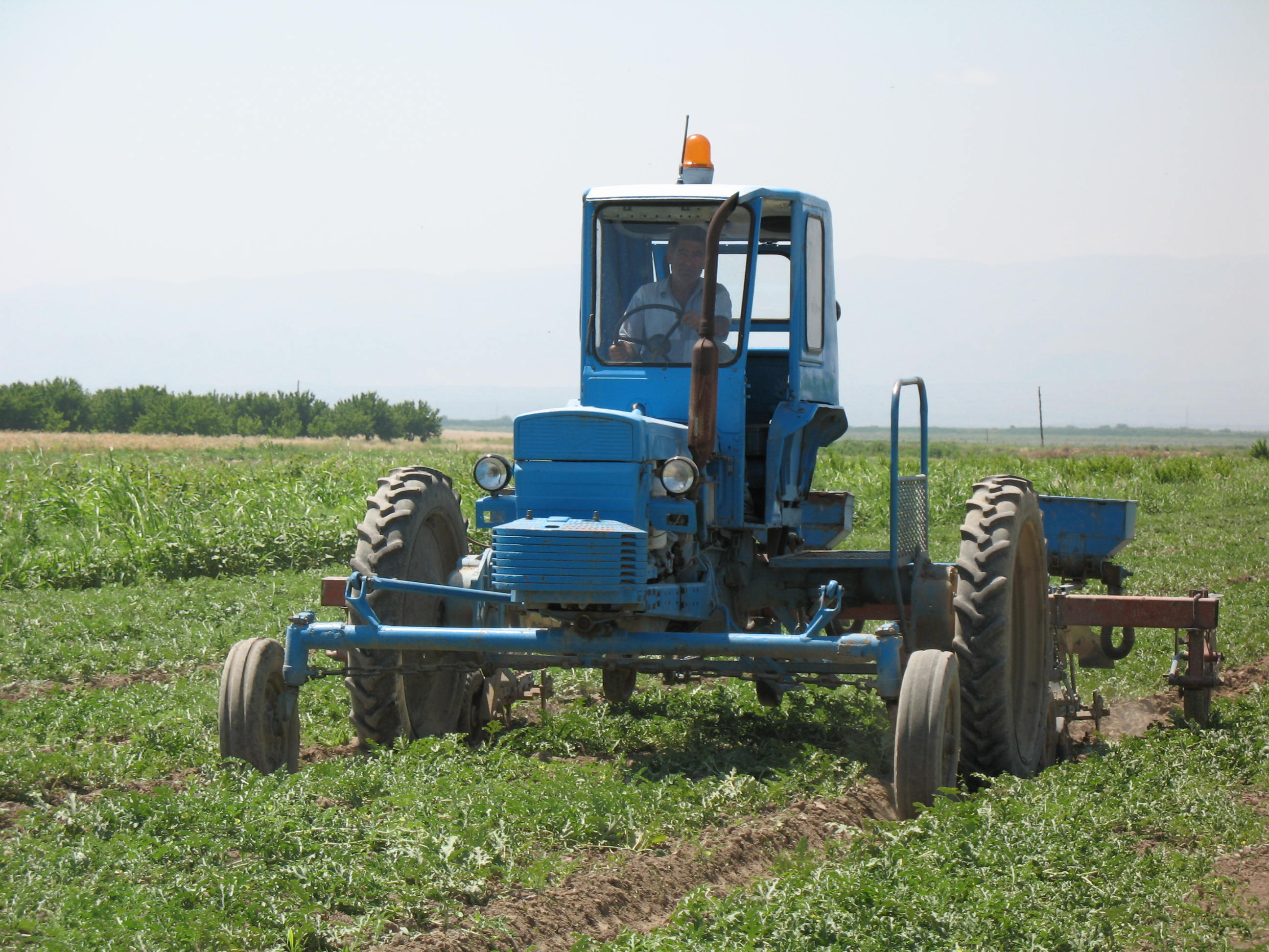 Տրակտորն աշխատանքի ժամանակ